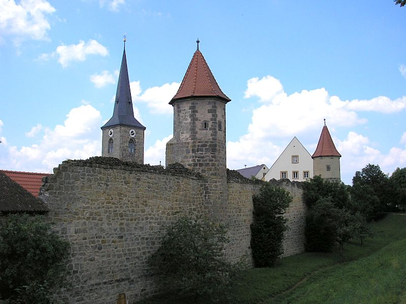 Seßlach (Landkreis Coburg, Oberfranken) / Sesslach, Franconia, Germany. Teil der Stadtmauer / Part of the medieval fortifications. Eigene Aufnahme, Juni 2006 / Own photo, June 2006